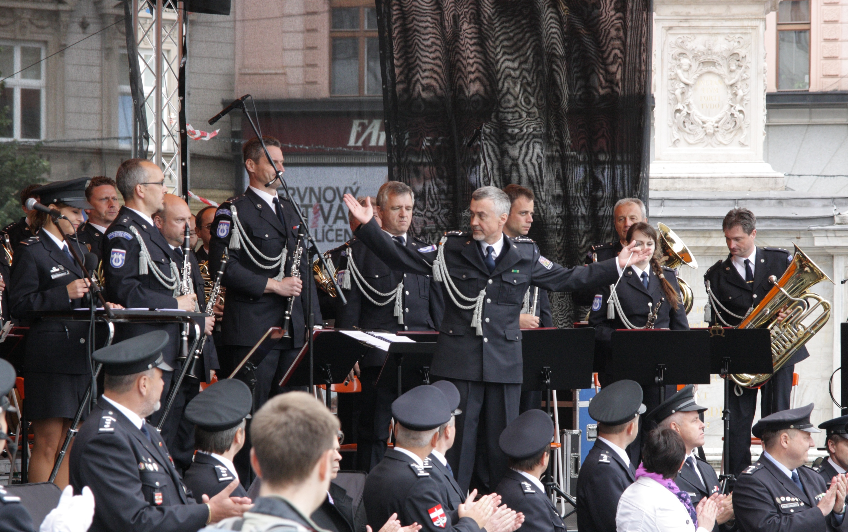 Brno, náměstí Svobody - slavnostní přísaha nových členů PČR a HZS JMK. Hudba Hradní stráže a Policie České republiky.